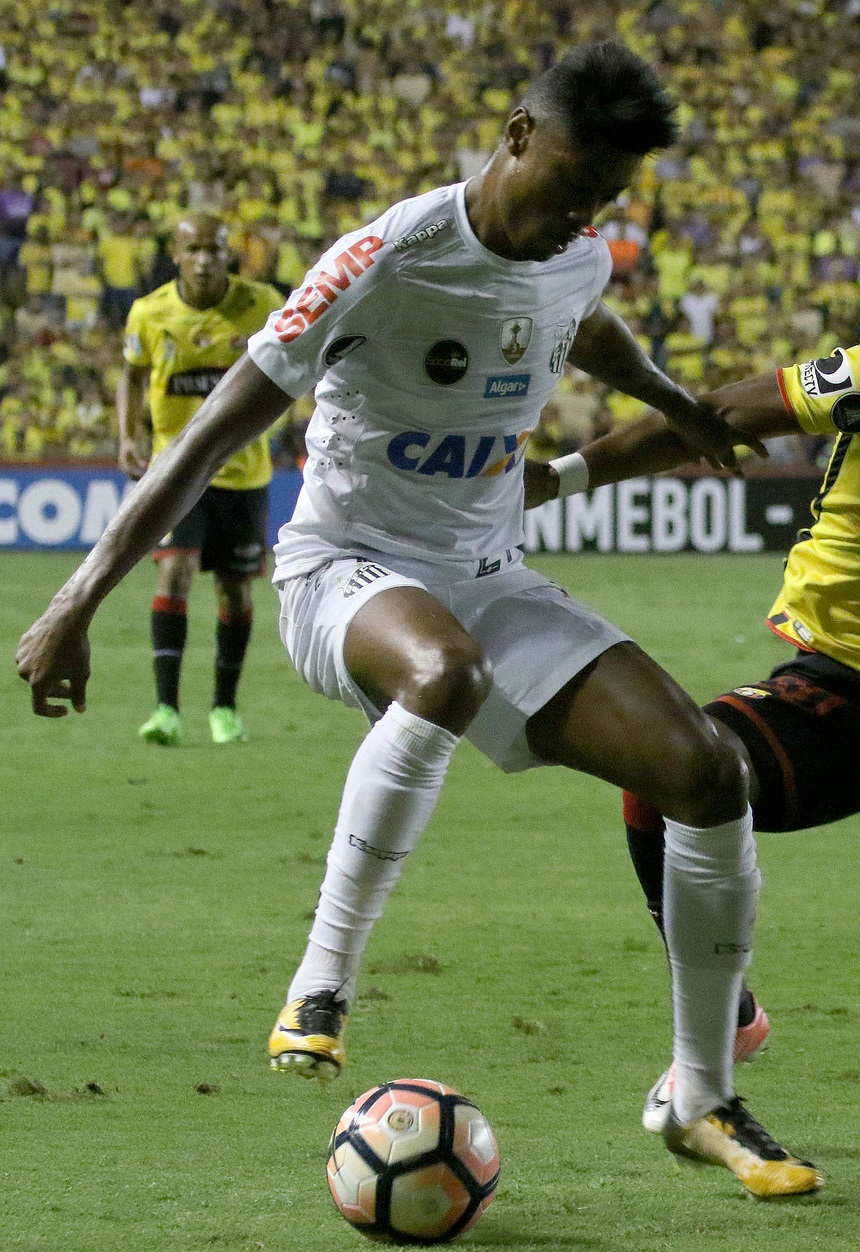 Guayaquil, 13 de septiembre del 2017 (Andes).-En el estadio Monumental Barcelona de Ecuador enfrenta al Santos de Brasil en partido de ida por cuartos de final de la Copa LibertadoresFoto:Andes/César Muñoz